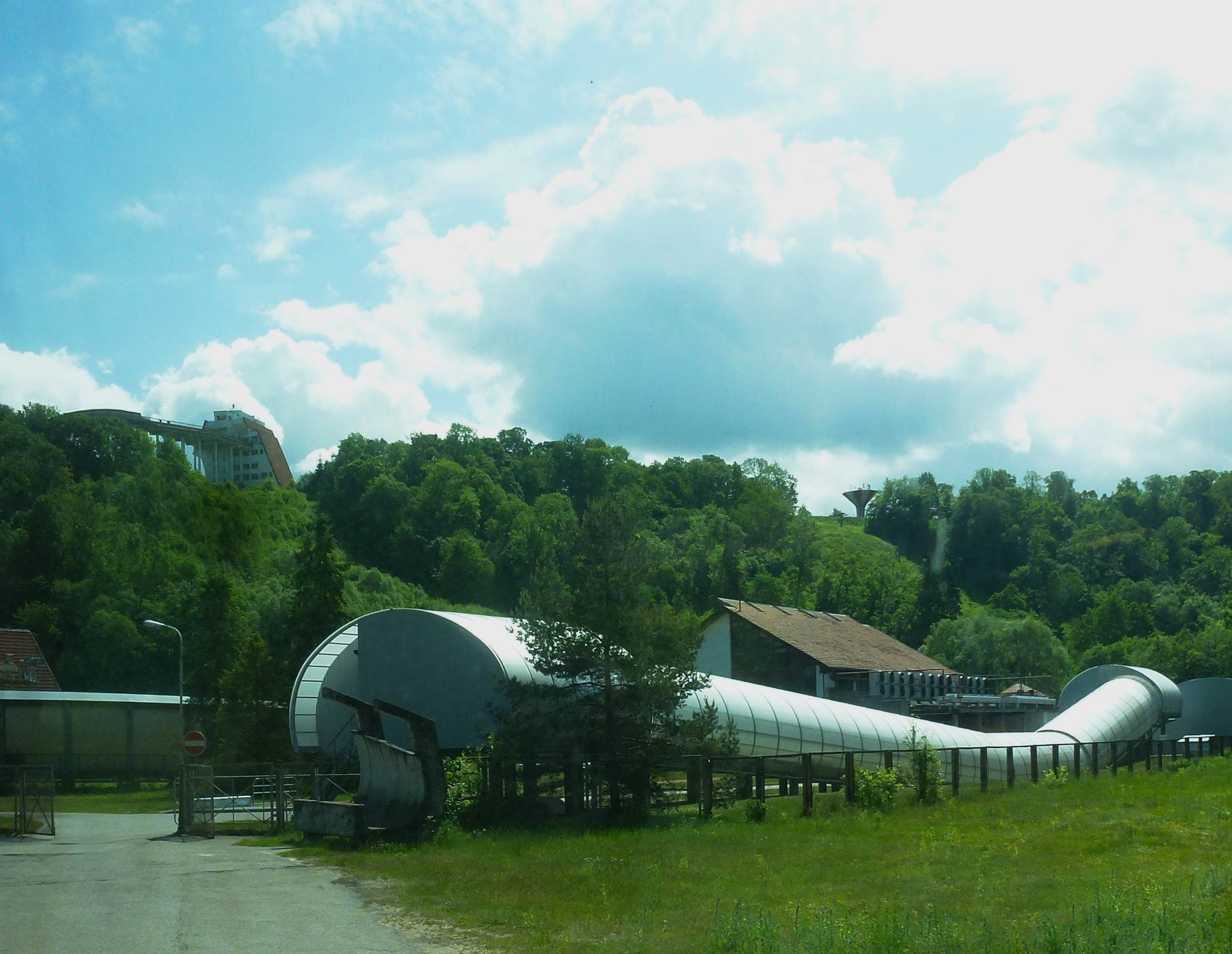 La piste de bobsleigh et son toboggan dans le Parc national de la Gauja, Sigulda, Latvia Lettonie